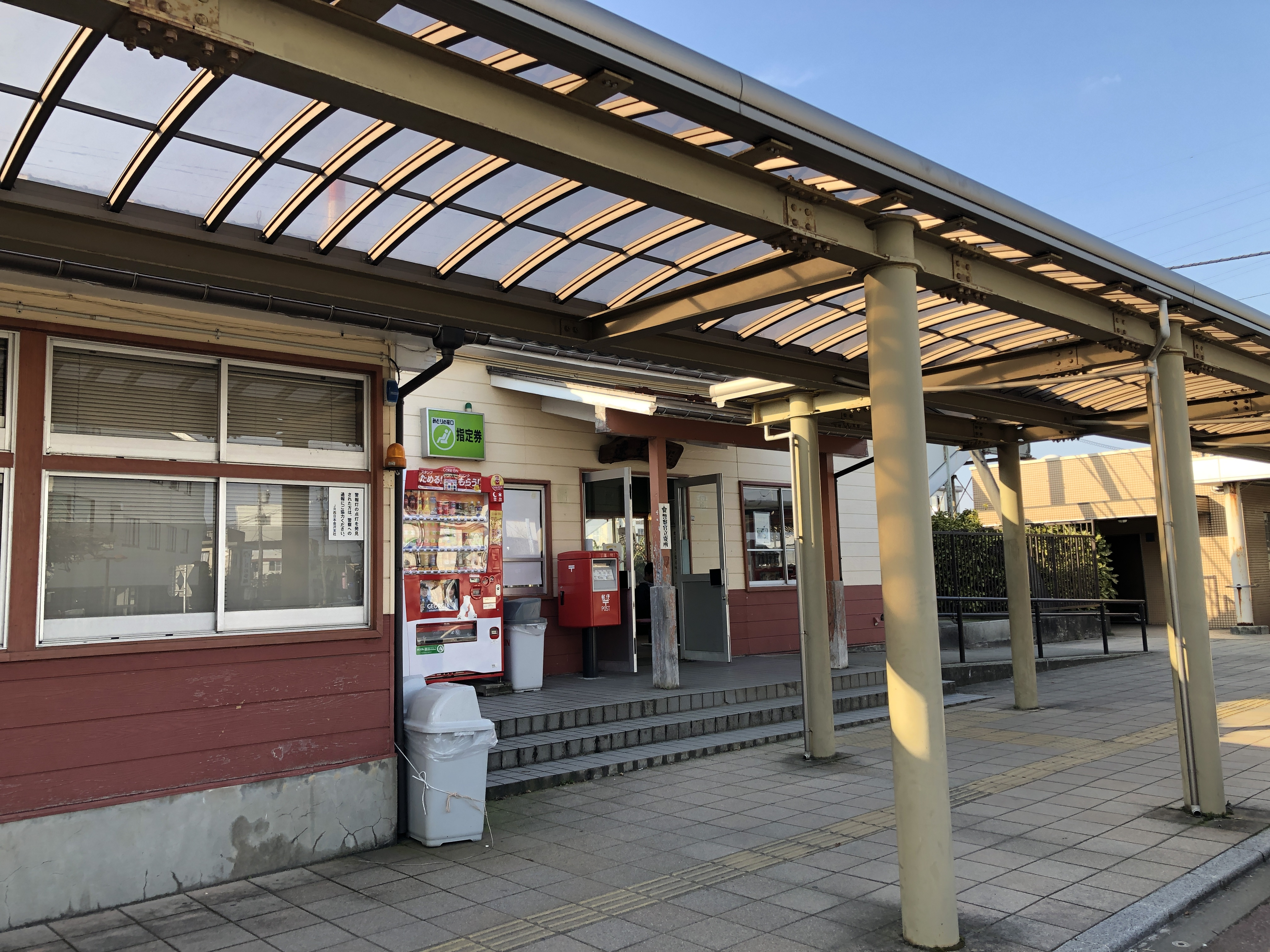 西日本旅客鉄道・日本貨物鉄道高山本線速星駅